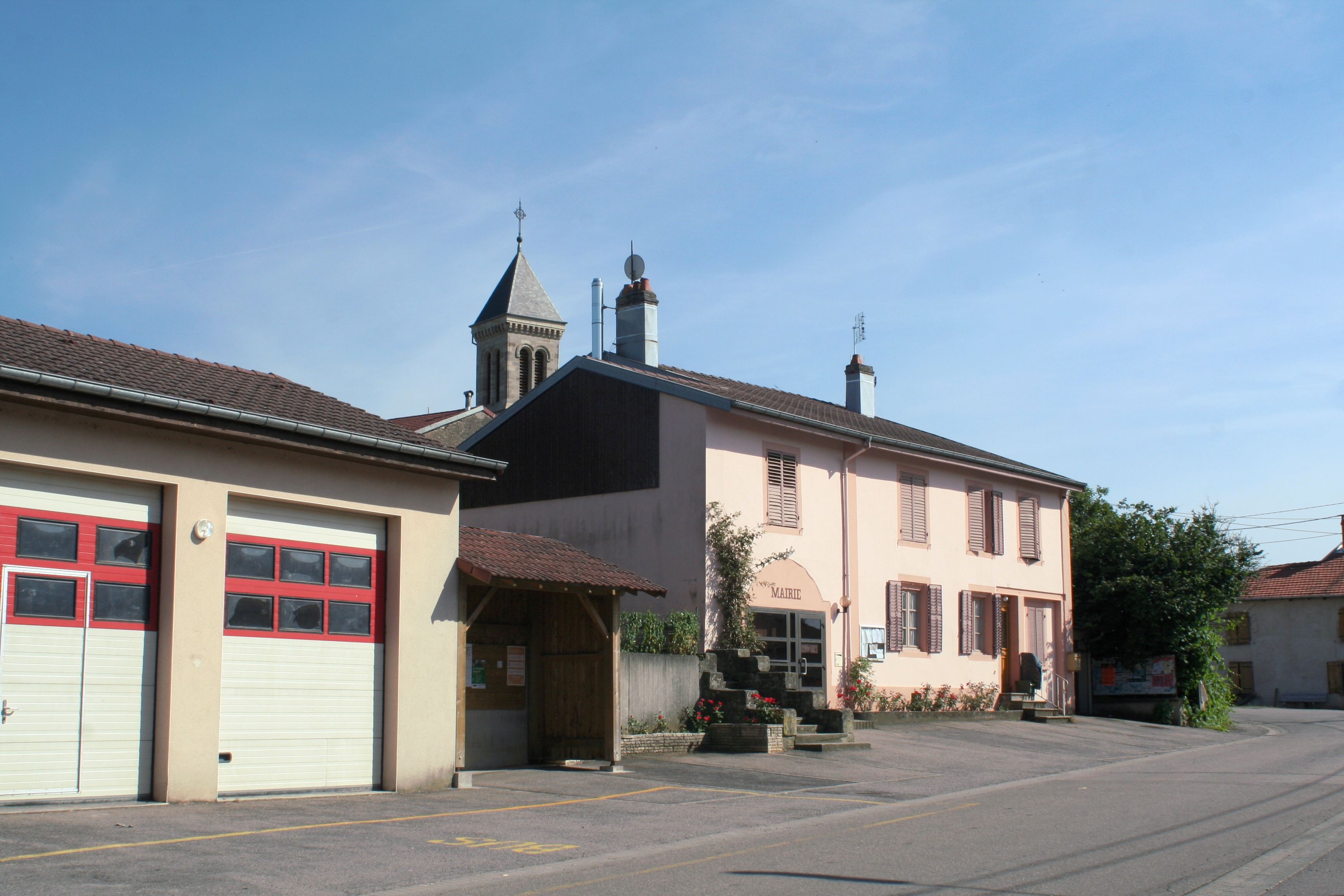 Mairie de Saint-Gorgon (Vosges)